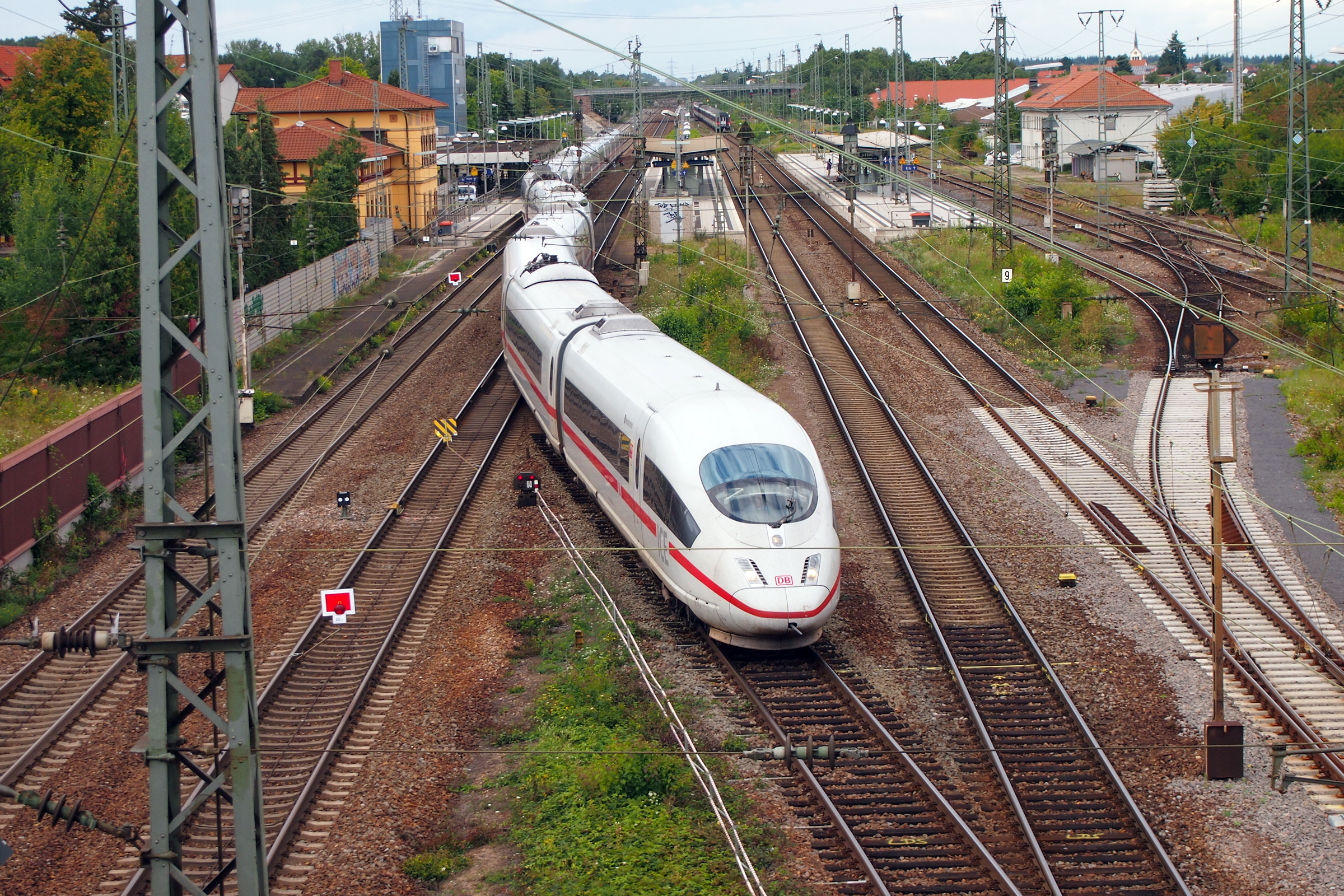 Graben-Neudorf Bahnhof. Blick nach Norden